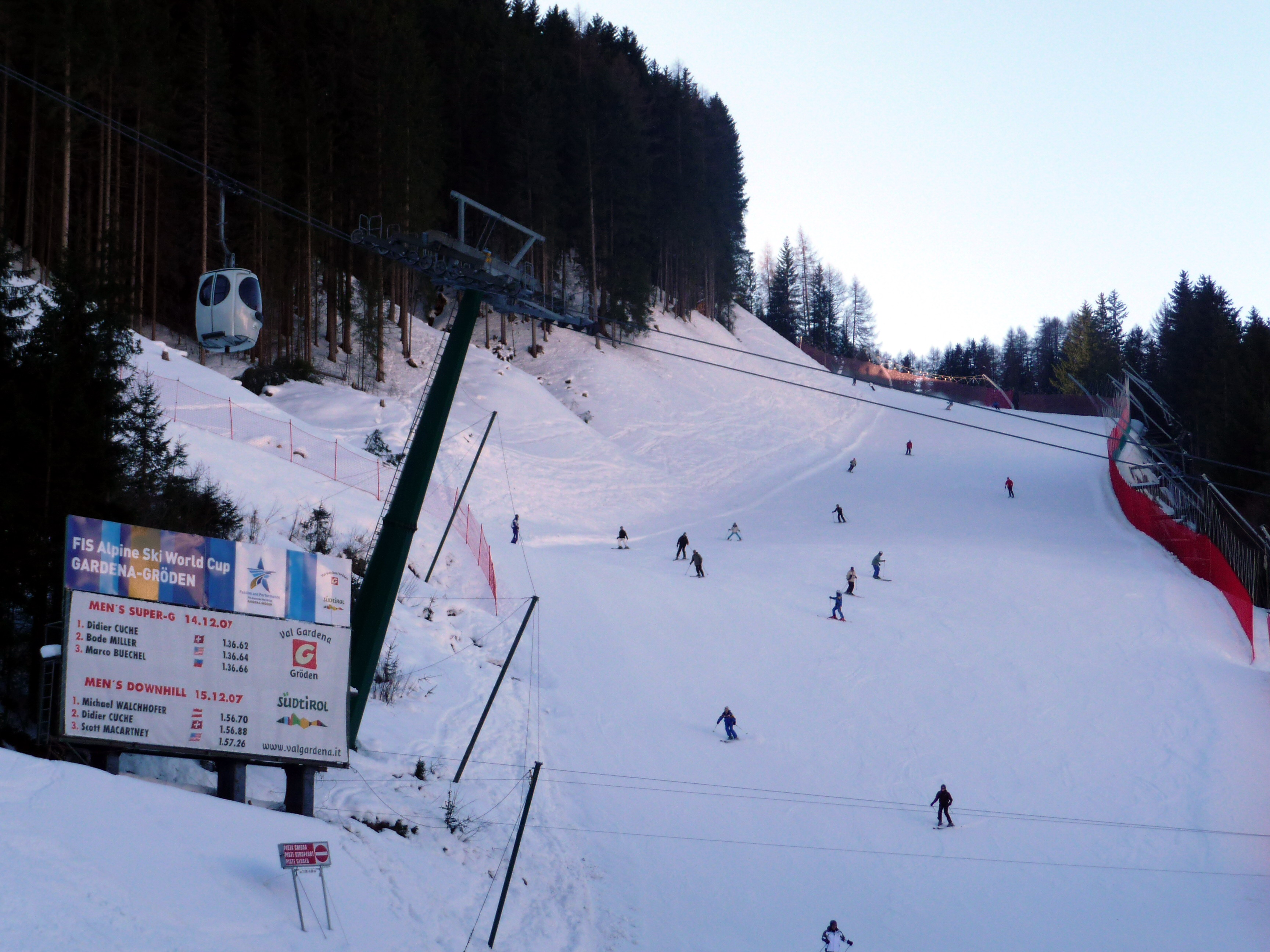 Arrivo pista nera Saslong, libera maschile